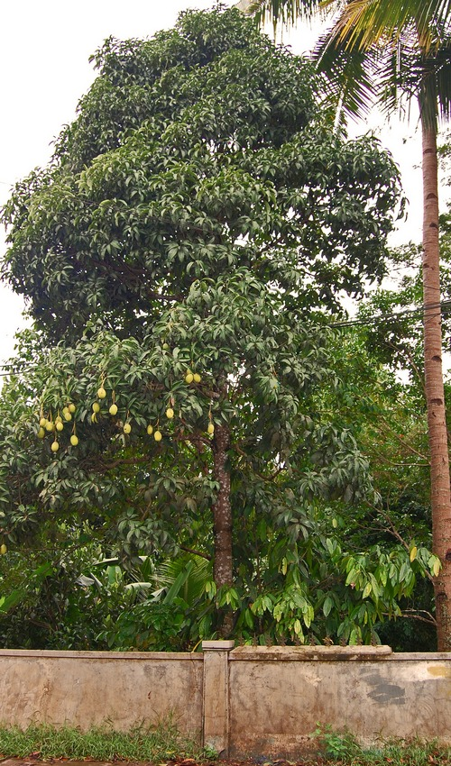 Mangifera odorata, fruiting tree. Pandeglang, Banten (west Java), Indonesia